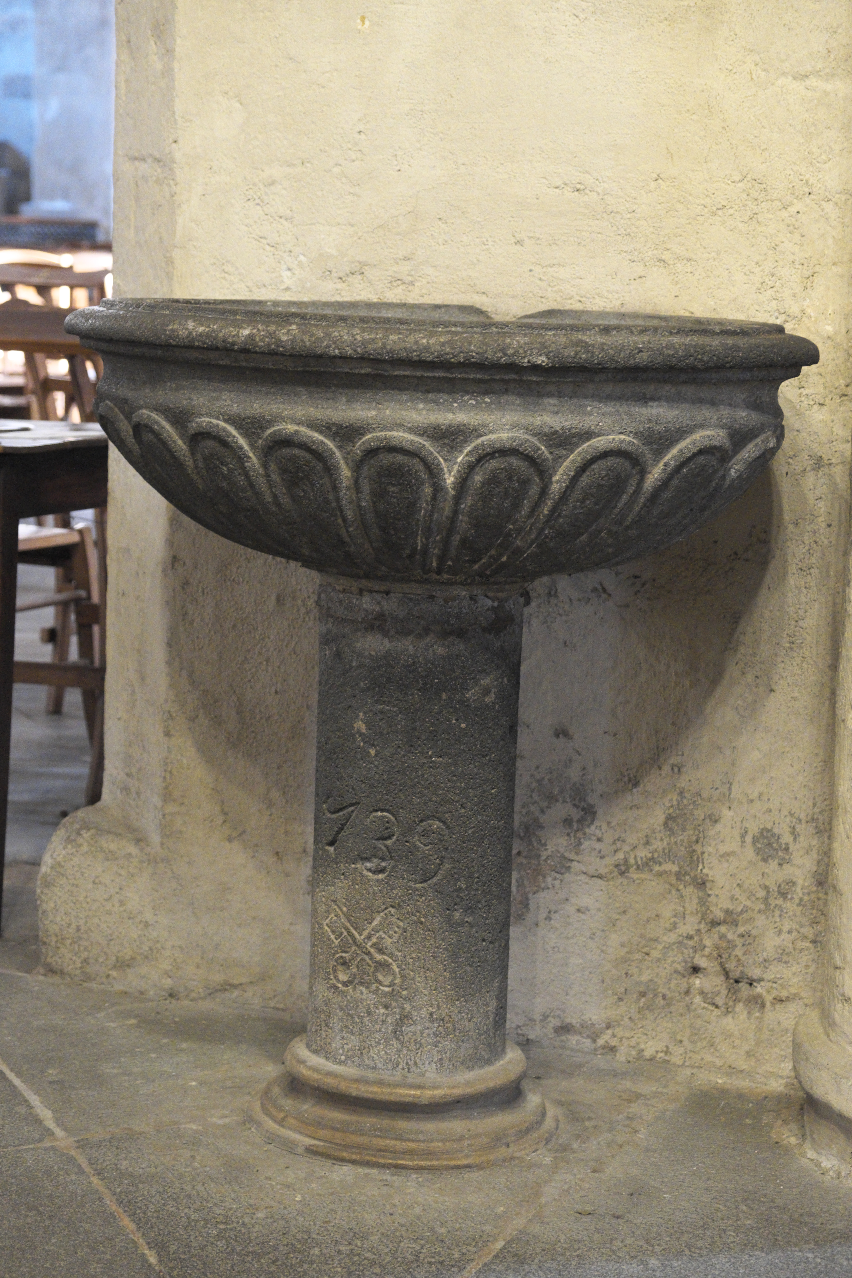 Katholische Kirche Saint-Pierre in Yzeure im Département Allier (Auvergne-Rhône-Alpes/Frankreich), Weihwasserbecken von 1739.